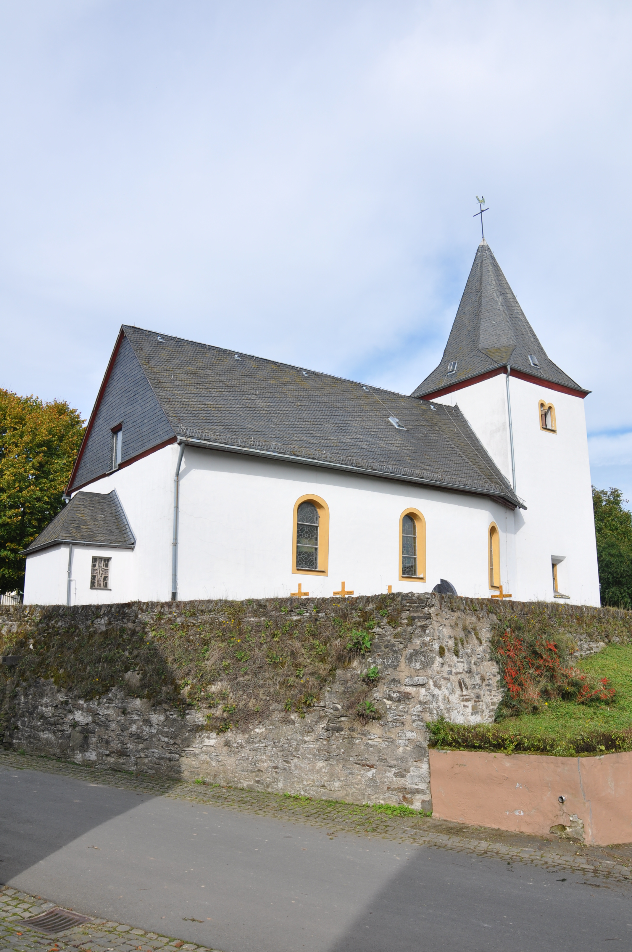 Weiler (Landkreis Cochem-Zell), St. Martin